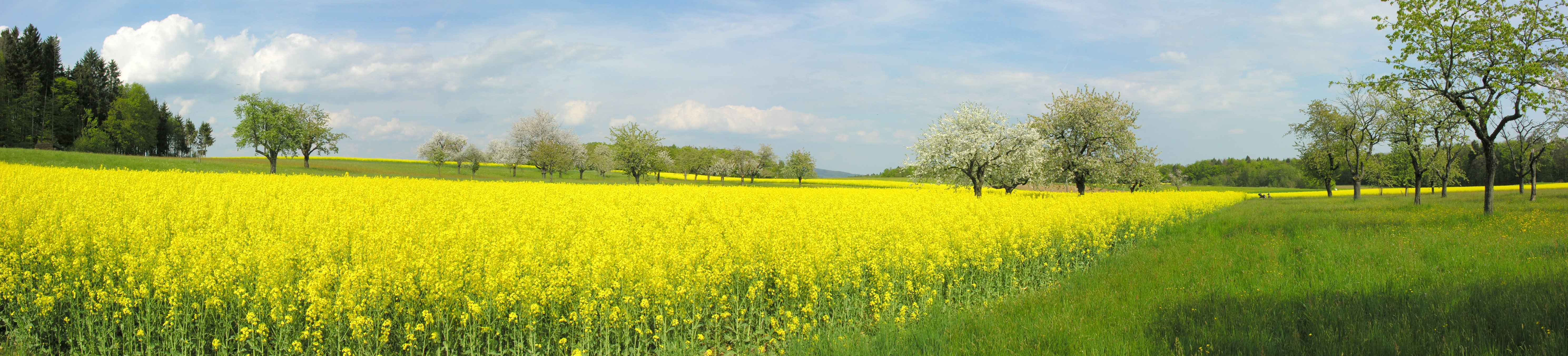 Büttenhardt